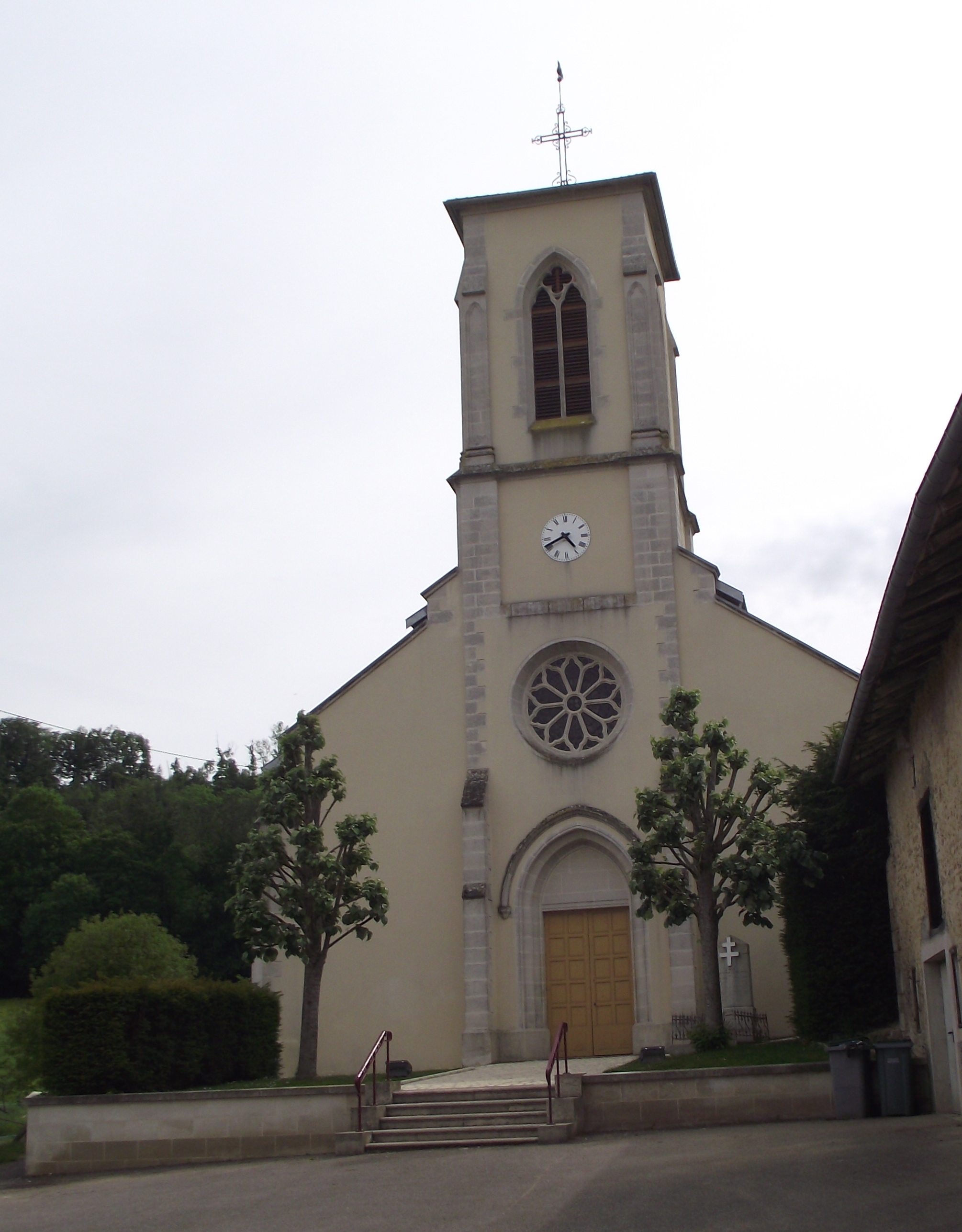 Église dédiée à saint Euchaire